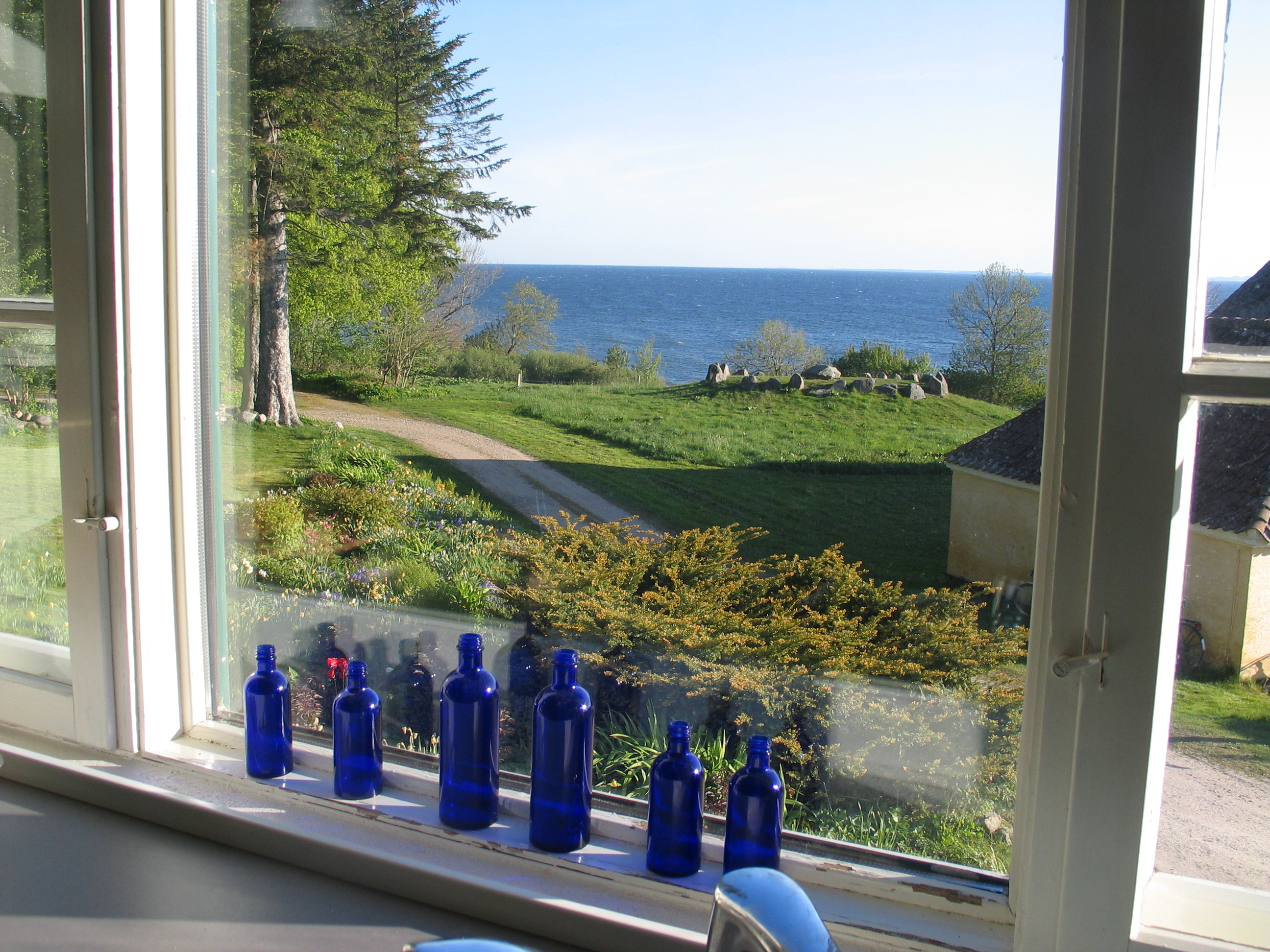 Gravhøjen er en runddysse fra bondestenalderen